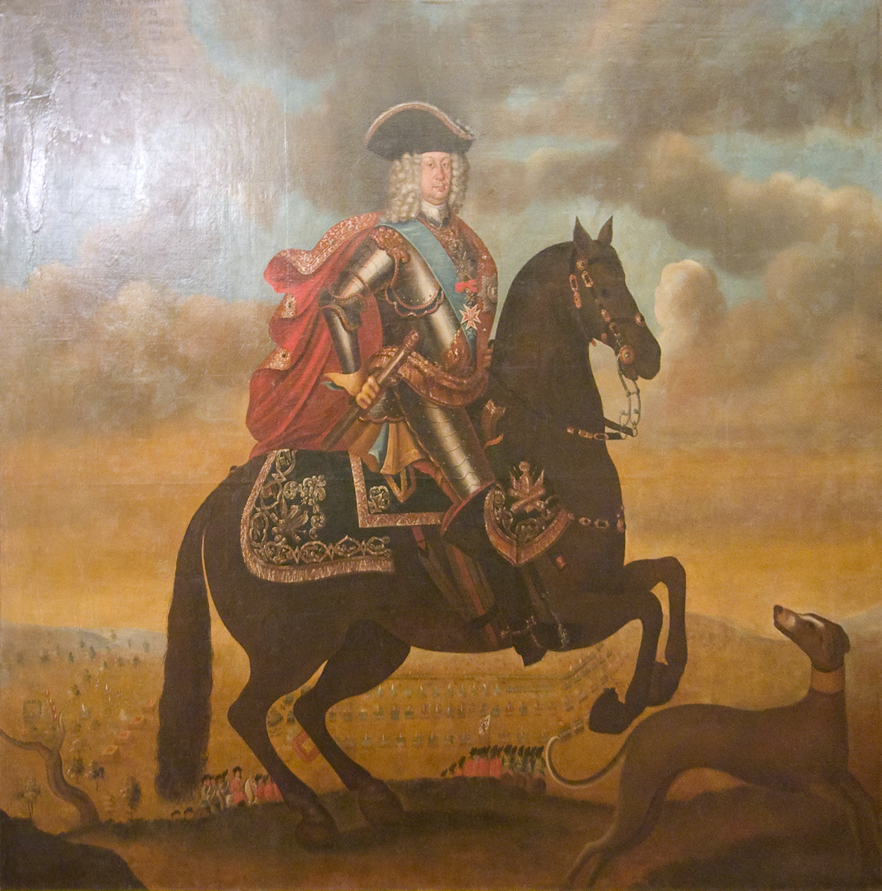 Портрет фельдмаршала графа Бориса Петровича Шереметьева (1652-1719), работа не ранее 1710. Холст, масло. Ж-5798. Русский Музей, Михайловский замок. Изображен в латах и треуголке; в руке фельдмаршальский жезл; с орденами святого Андрея Первозванного (лента и звезда) и святого Иоанна Иерусалимского (командорский крест и звезда).